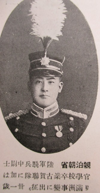 中文（香港）: 親泊朝省像